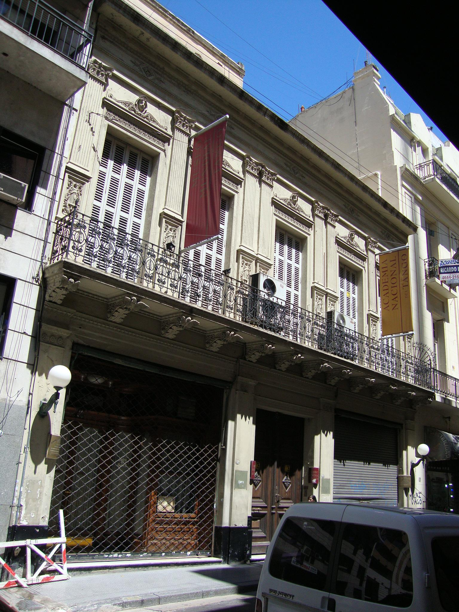 Frente de la residencia de la familia Unzué en la calle Rivadavia, de la segunda mitad del siglo XIX. En la planta baja funciona el Café Tortoni desde 1880, y en la planta alta está la Academia Nacional de Tango.